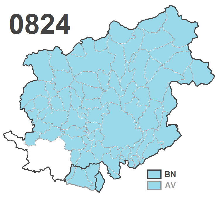 Mappa dei comuni con prefisso telefonico 0824 nelle province di Benevento ed Avellino